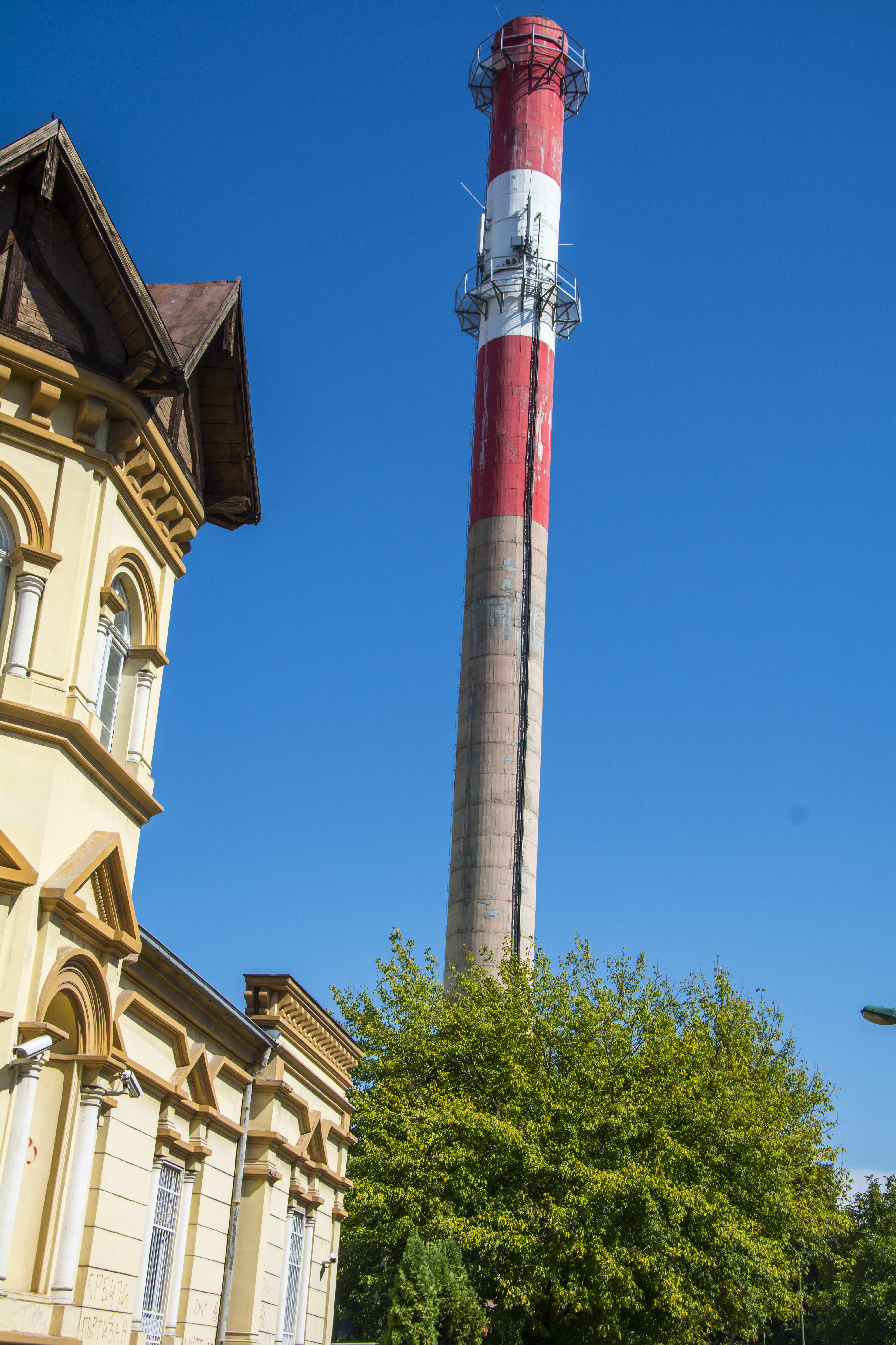 Старо Нишко гробље